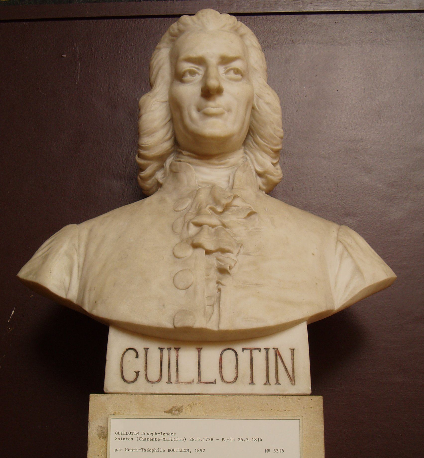 Henry-Théophile Bouillon (1864-1934), Joseph Ignace Guillotin (1892), buste en marbre, Versailles, salle du Jeu de paume, musée du château de Versailles.